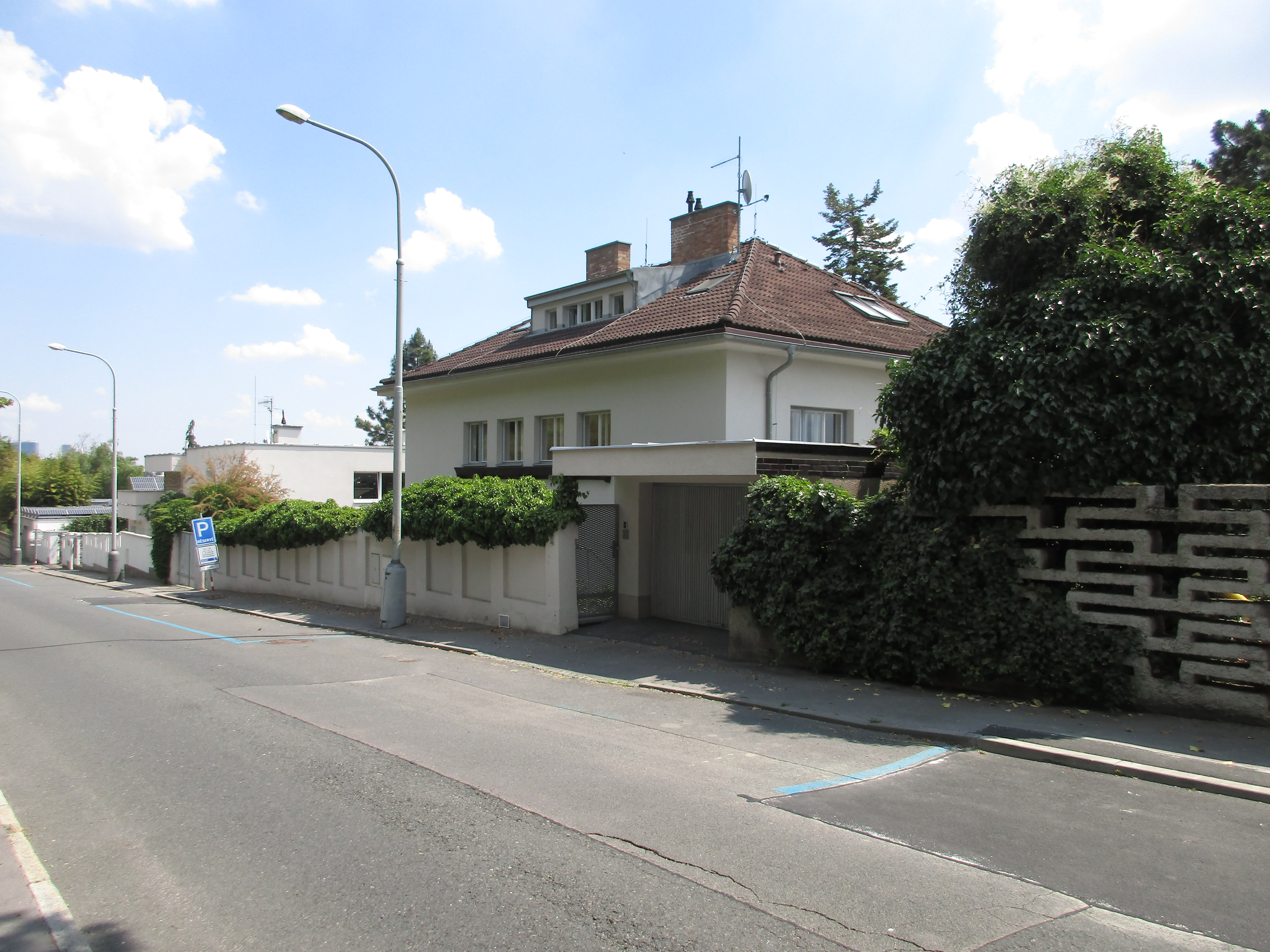 Barrandovská 447/21, Praha 5-Hlubočepy